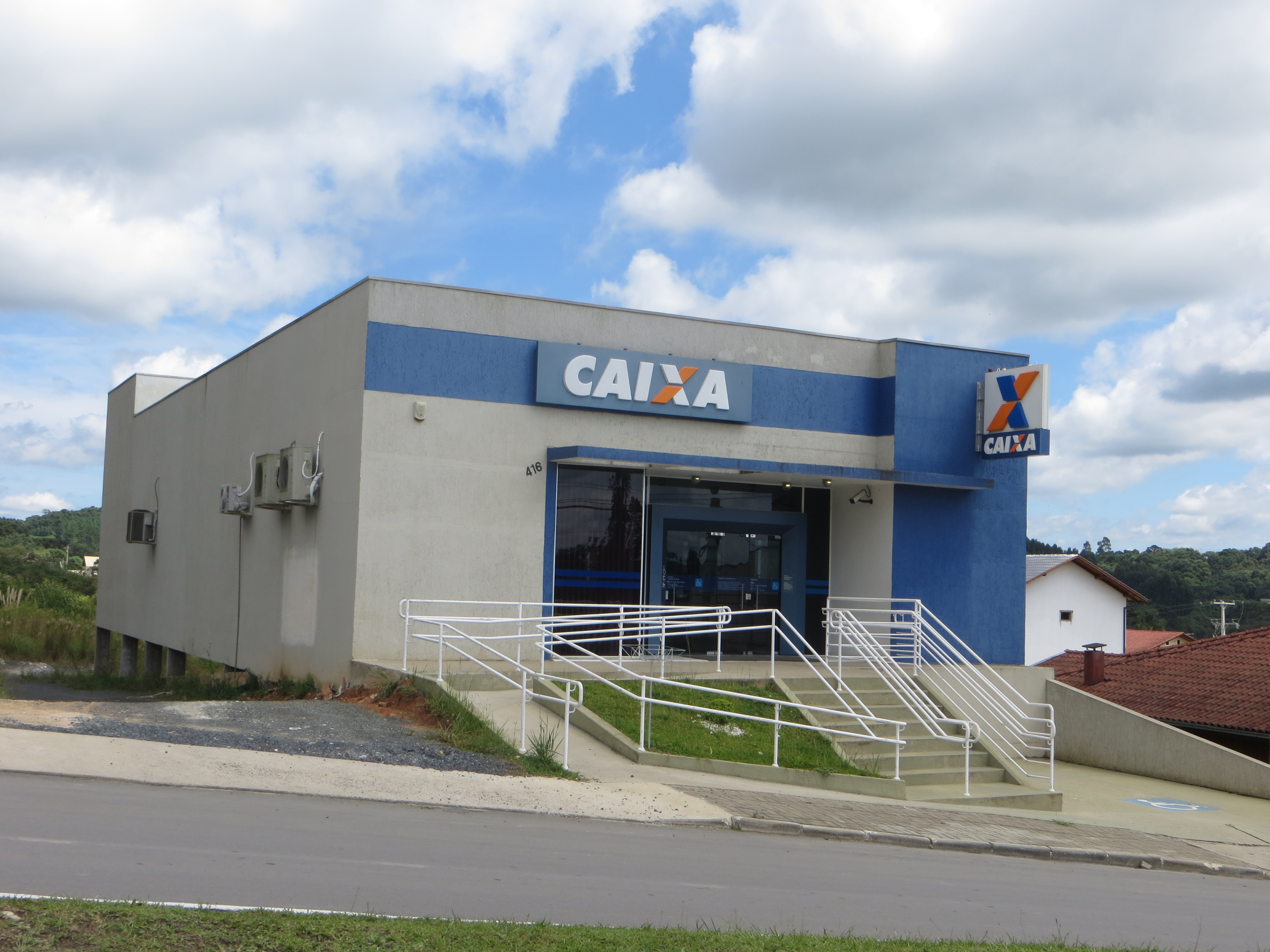 Agência da Caixa em Piên, Estado do Paraná, Região Sul do Brasil.